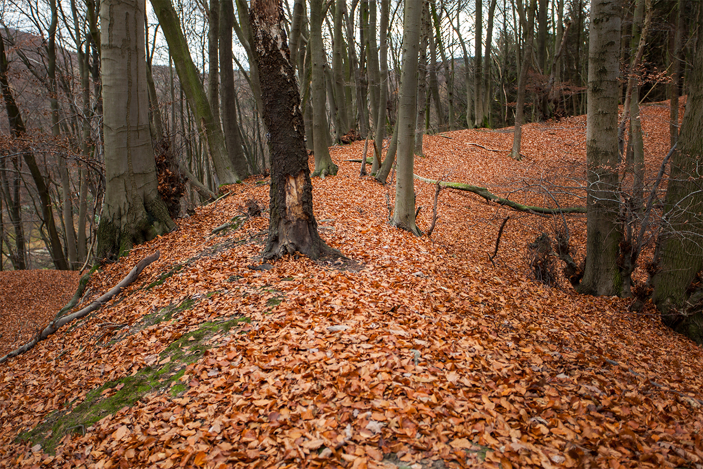 Babilonie, Wall der Hauptburg im Nordosten